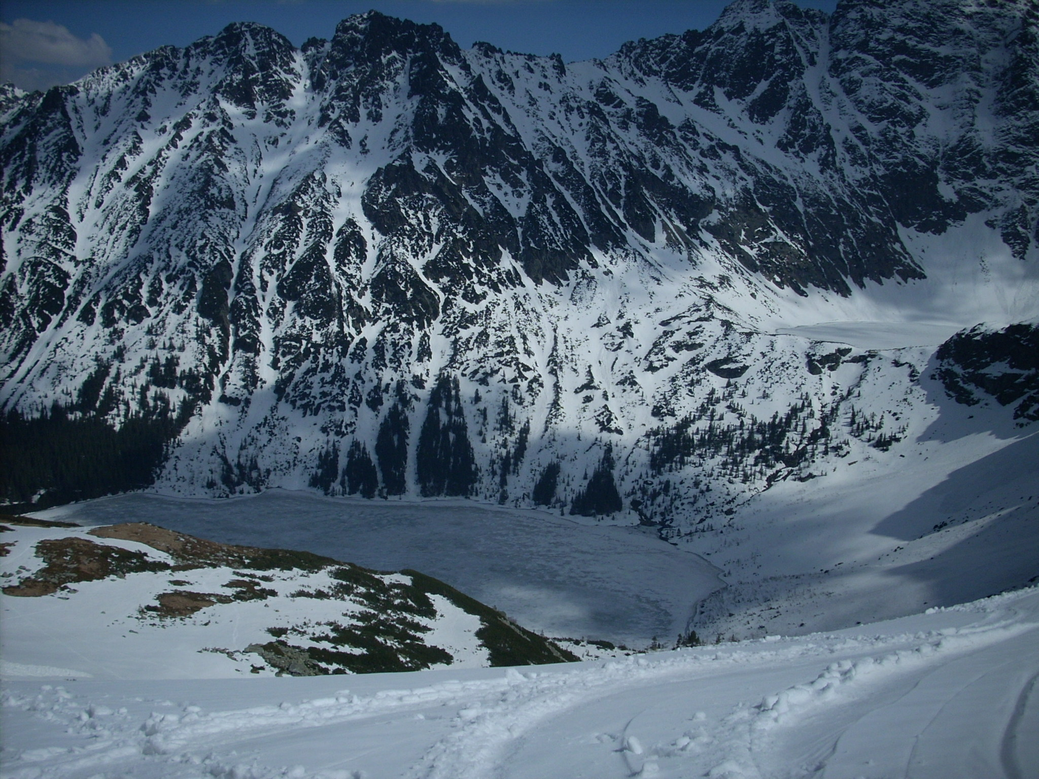 Kwietniowy widok na Morskie Oko i Czarny Staw ze szlaku na Szpiglasową Przełęcz